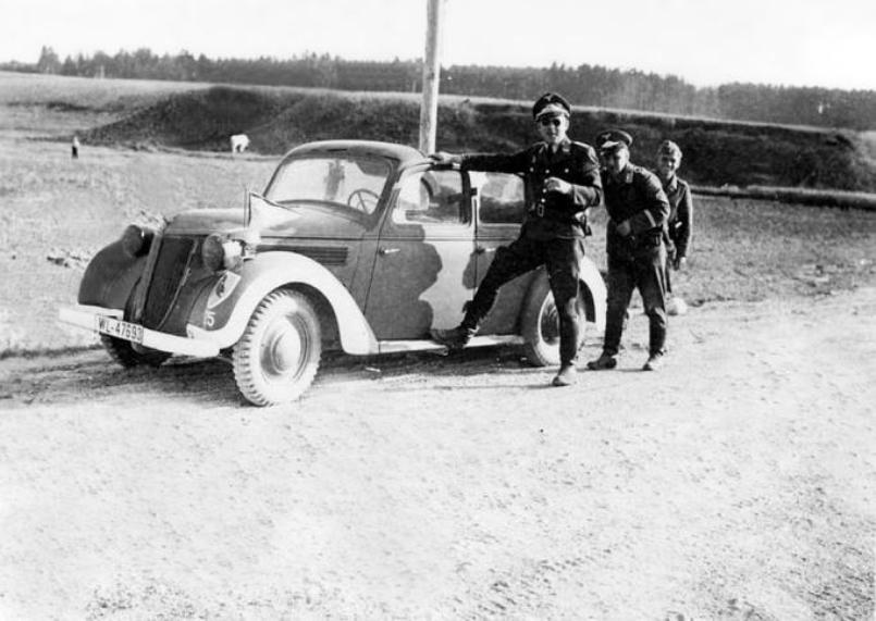 Żołnierze niemieccy jednostki lotniczej na lotnisku Praschnitz (Przasnysz) - 1941r.